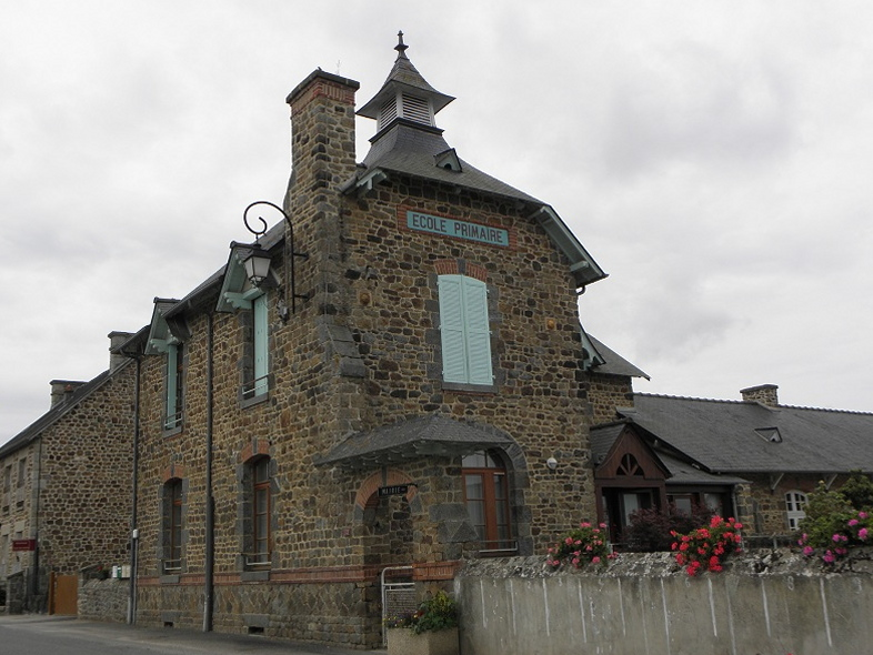 Mairie de Saint-Thual (35).